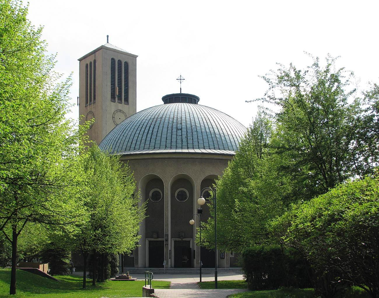 Bytom - Widok kościoła Podwyższenia Krzyża Świętego od ul. Axentowicza